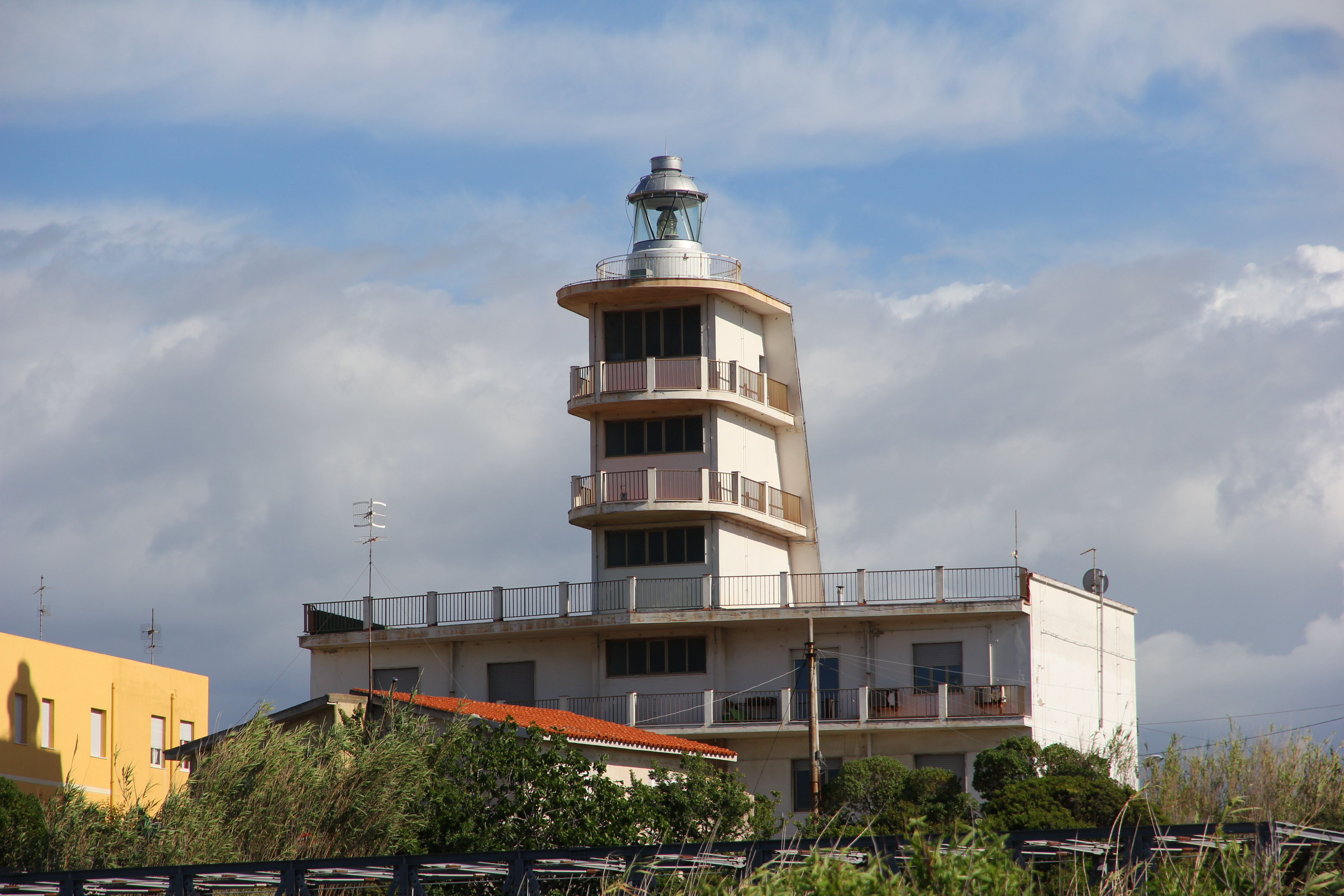 Porto Torres - Il faro